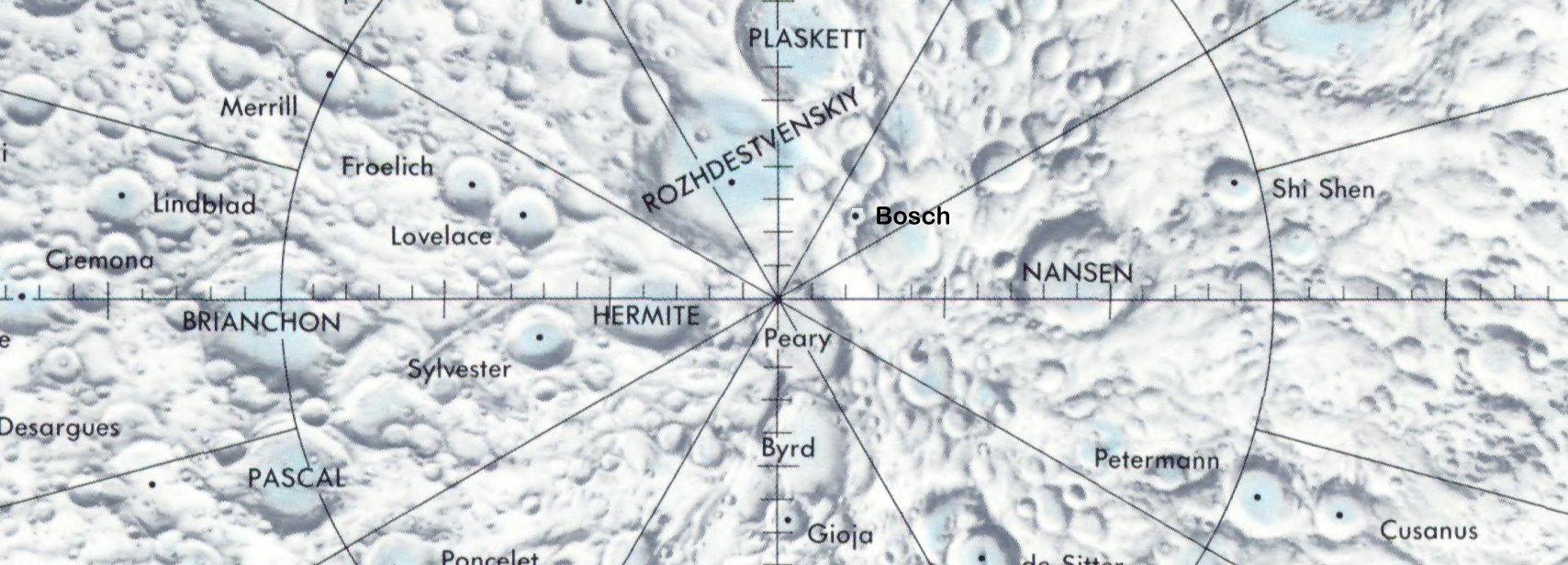 Cráter lunar Bosch. Localización. (Lunar Chart LPC1. Second Edition)